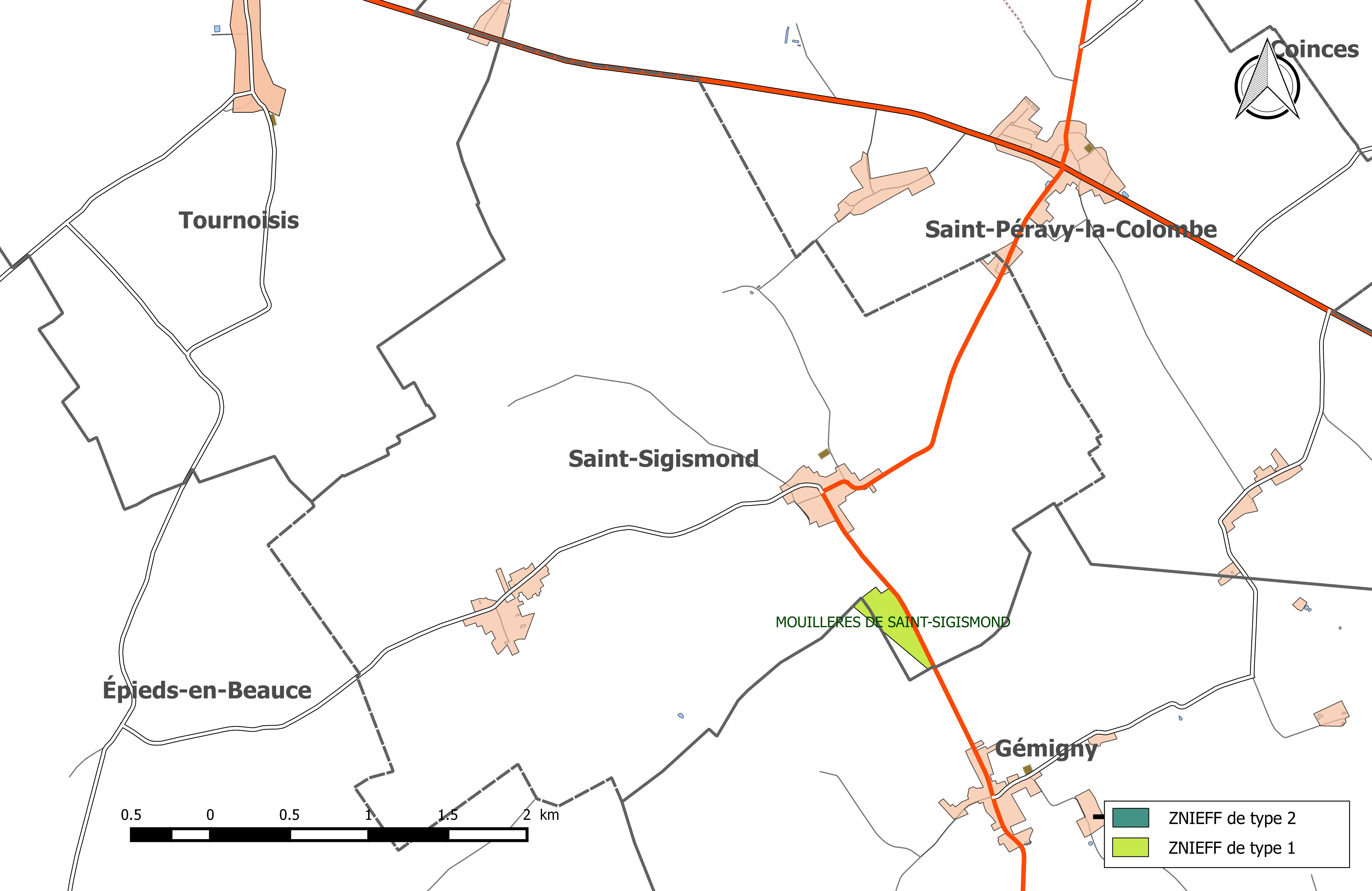 Carte des Zones naturelles d'intérêt écologique faunistique et Floristique (ZNIEFF) de la commune de Saint-Sigismond (Loiret).